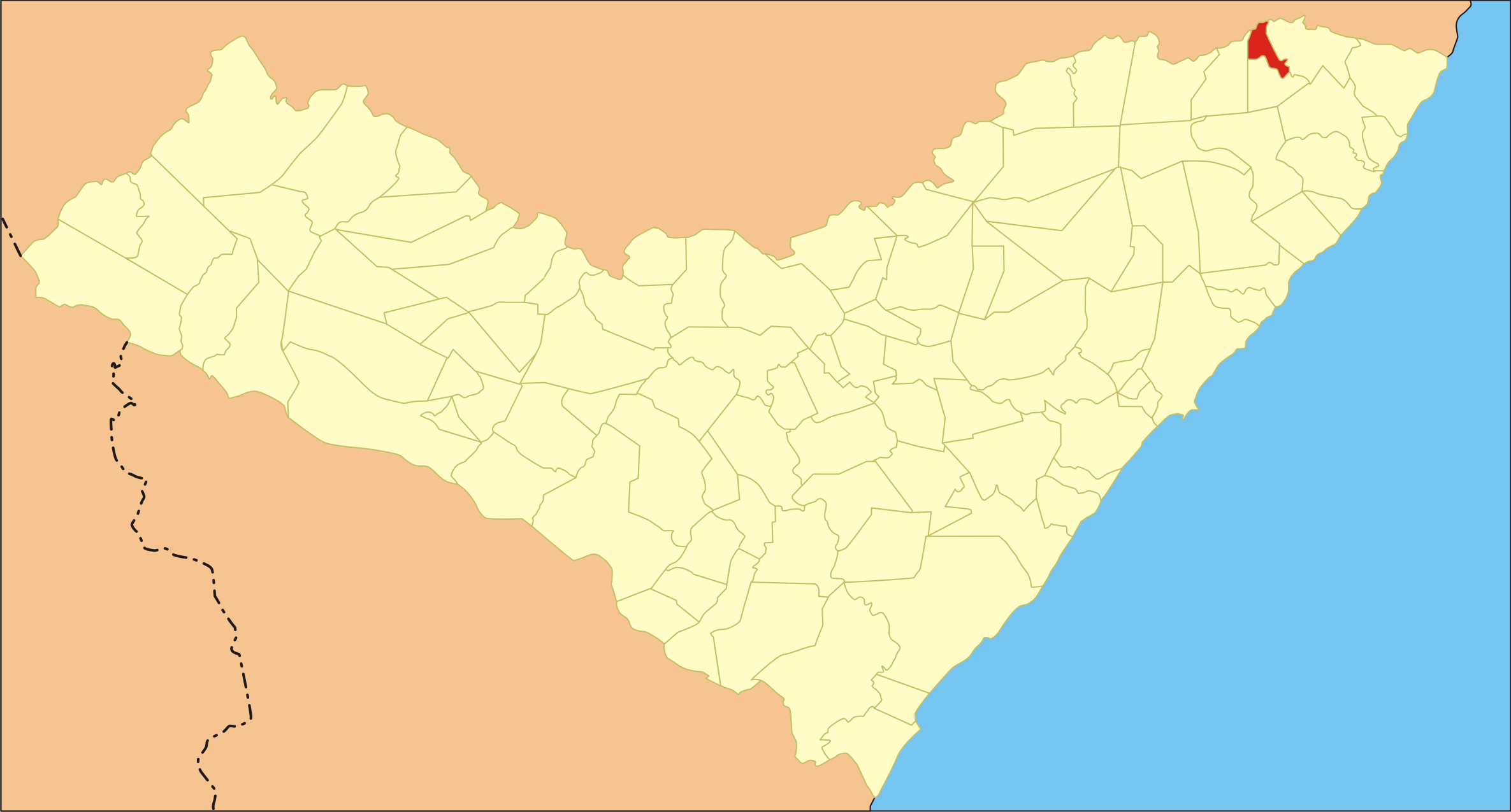 Localização da cidade em Alagoas